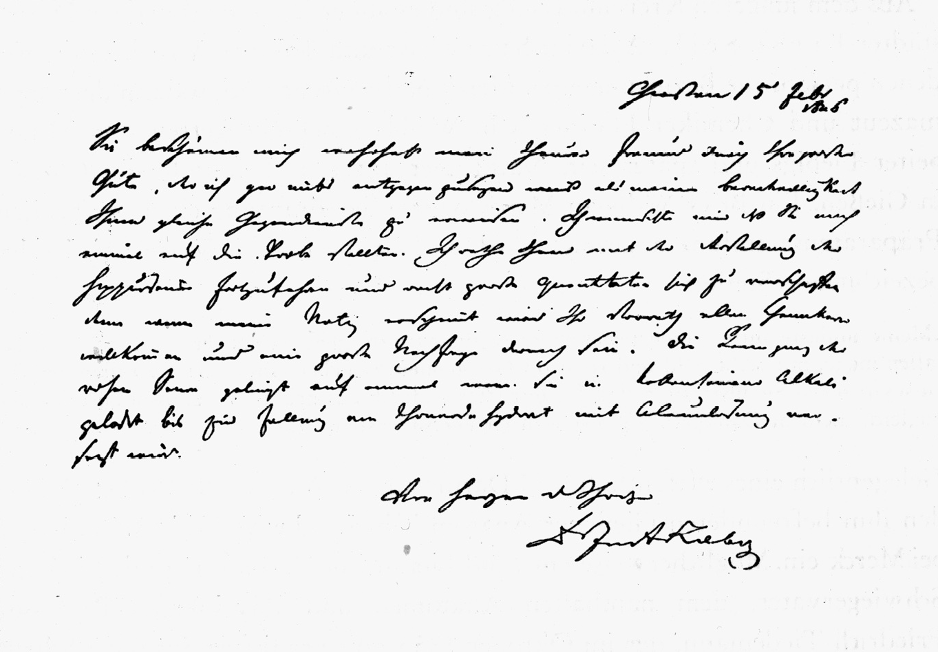 Dankschreiben Liebigs an Merck